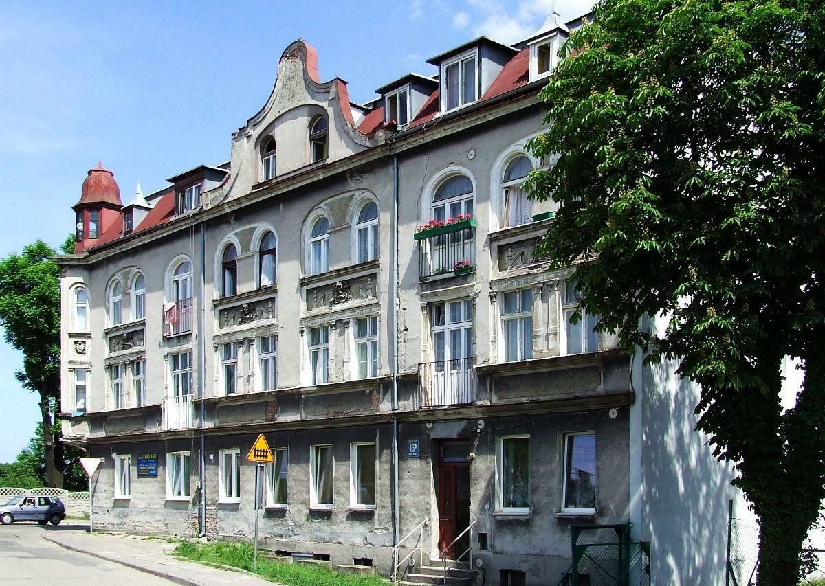 Kamienica nr 16 A od strony ul. Przy Torze